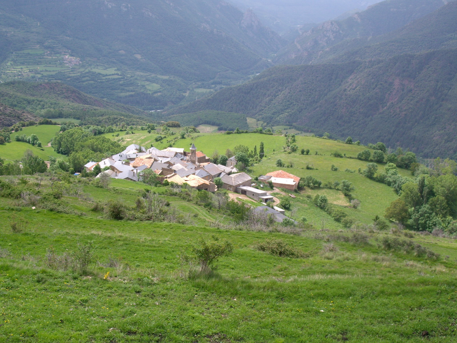 Vista d'Estac, poble del Pallars Sobirà, a Catalunya